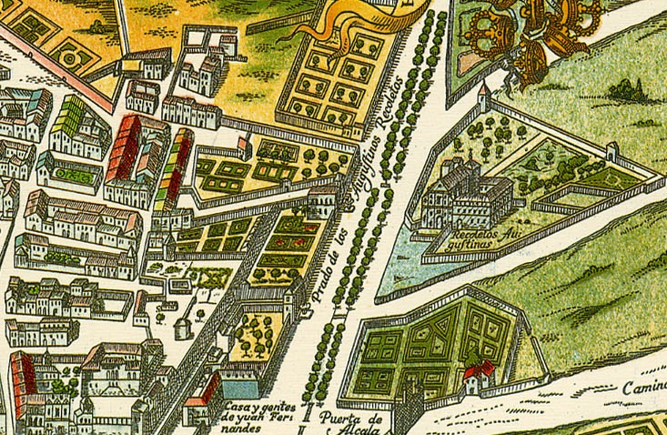 Detalle del Paseo de Recoletos en la plancha derecha de 'La Villa de Madrid Corte de los Reyes Católicos de Espanna', plano del Madrid de los años 1614 a 1622, según una reedición del grabador holandés Frederic de Witt, hacia 1635.(Mapa de Antonio Mancelli 1622-1635 del original digitalizado por la Biblioteca nacional de España)